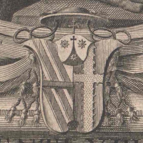 Wappen vom Portrait des Kardinals Giovanni Antonio Guadagni († 1759); Wien, Österreichische Nationalbibliothek, Bildarchiv und Grafiksammlung, Porträtsammlung, Inventar-Nr. PORT_00081783_01